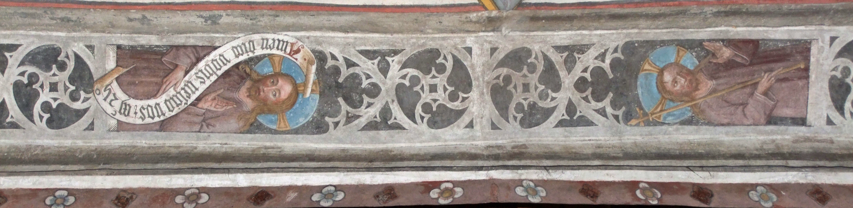 Kirche Unser Frauen zu Memmingen